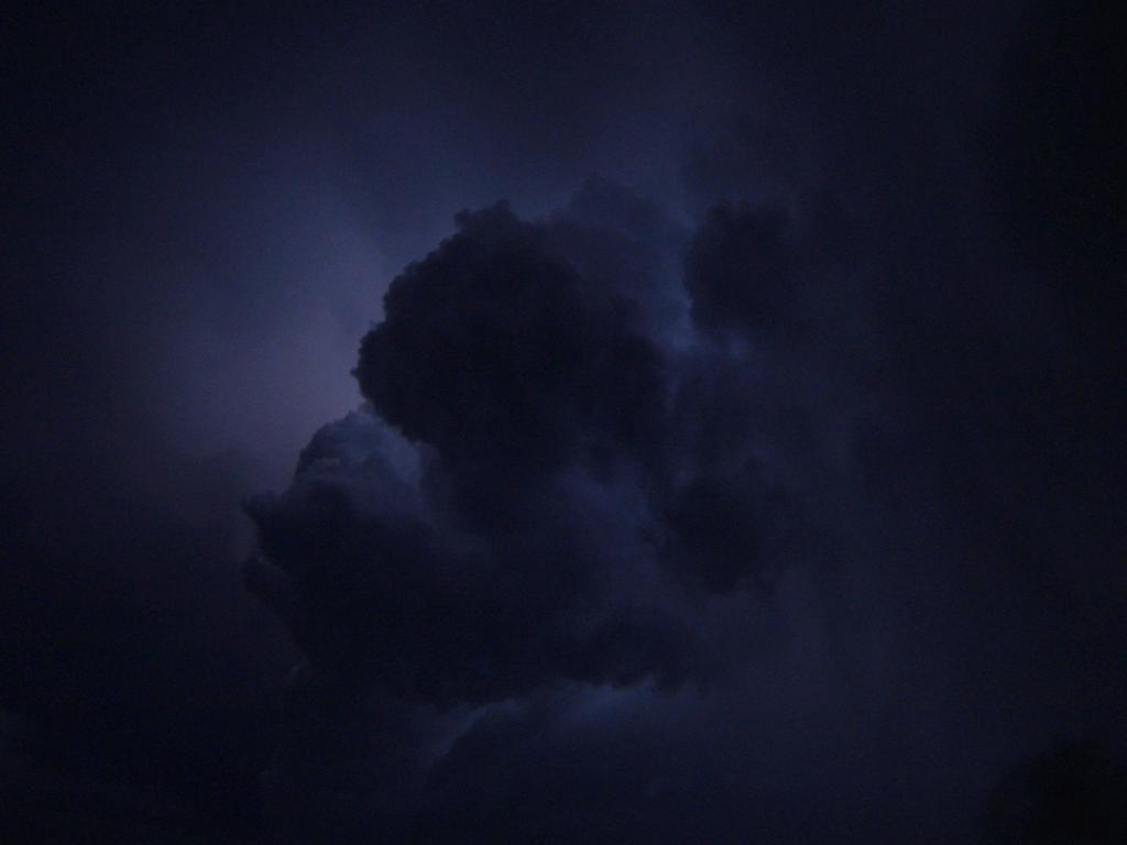 Wetterleuchten auf Formentera, Spanien, 2004